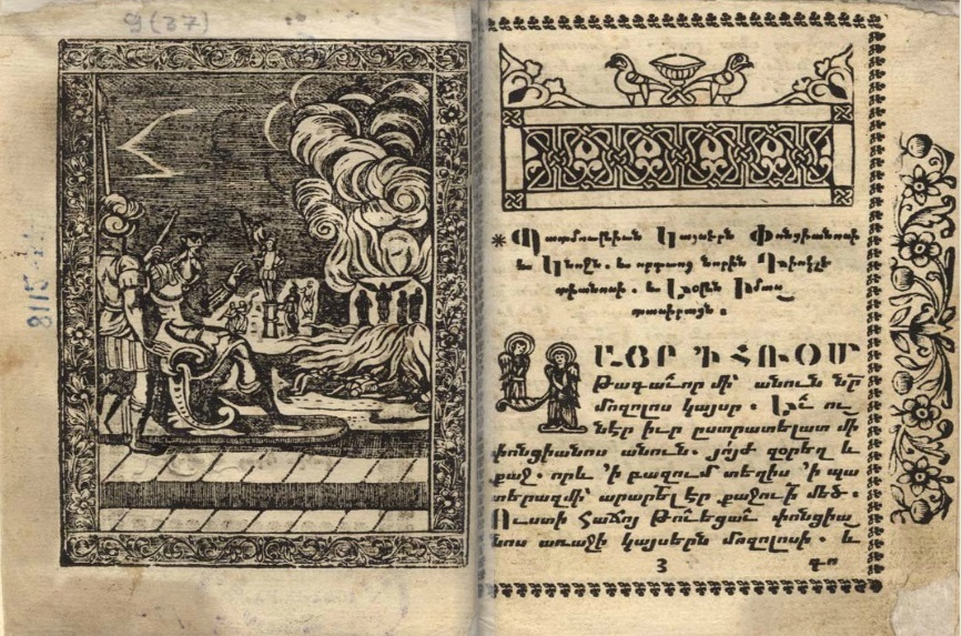 Первые страницы "Истории семи мудрецов". Константинополь, 1740 год.